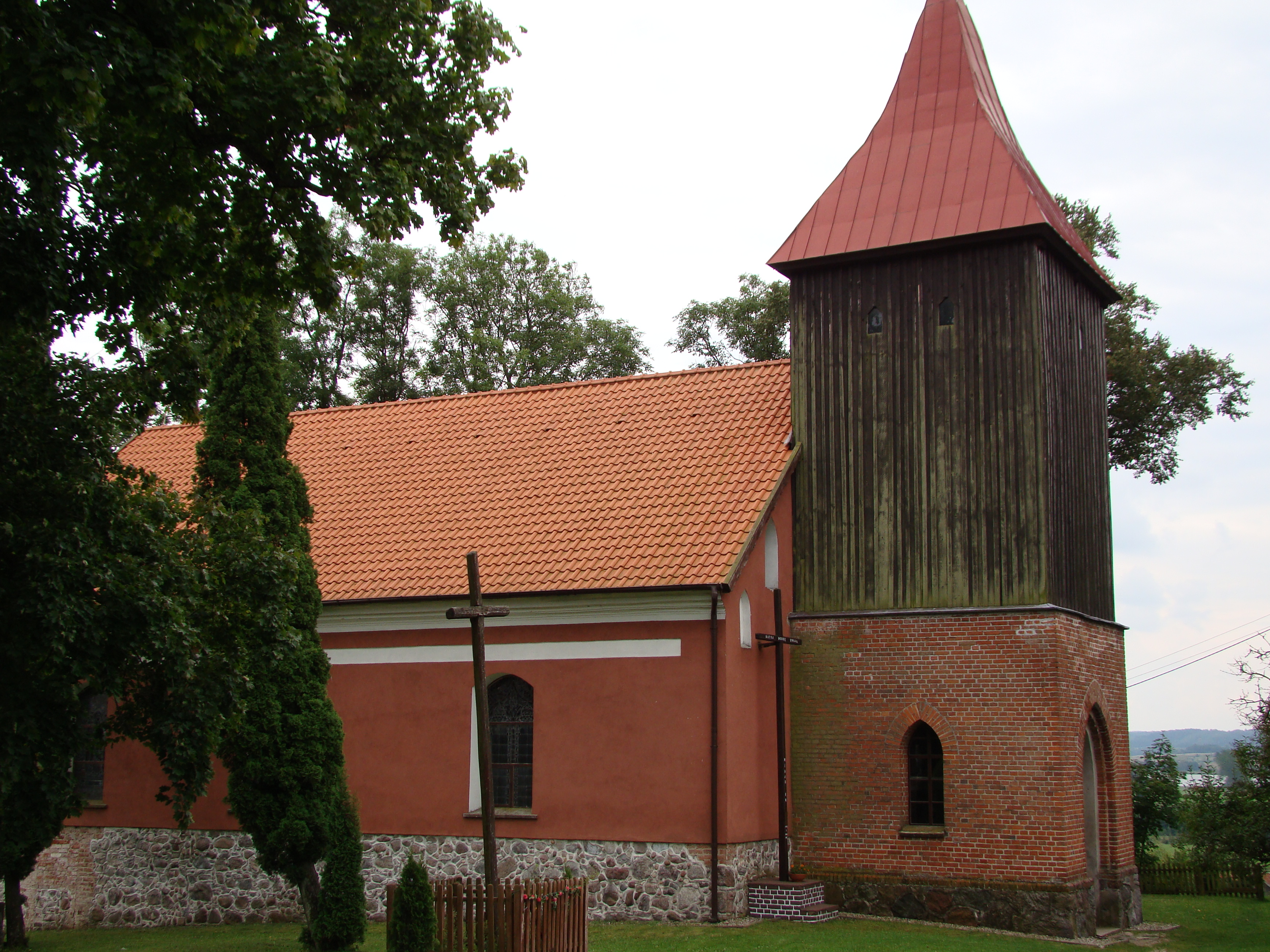 Blanki - kościół parafialny p.w. św. Michała Archanioła (zabytek nr A-1152 i 815 z 3.09.1968)